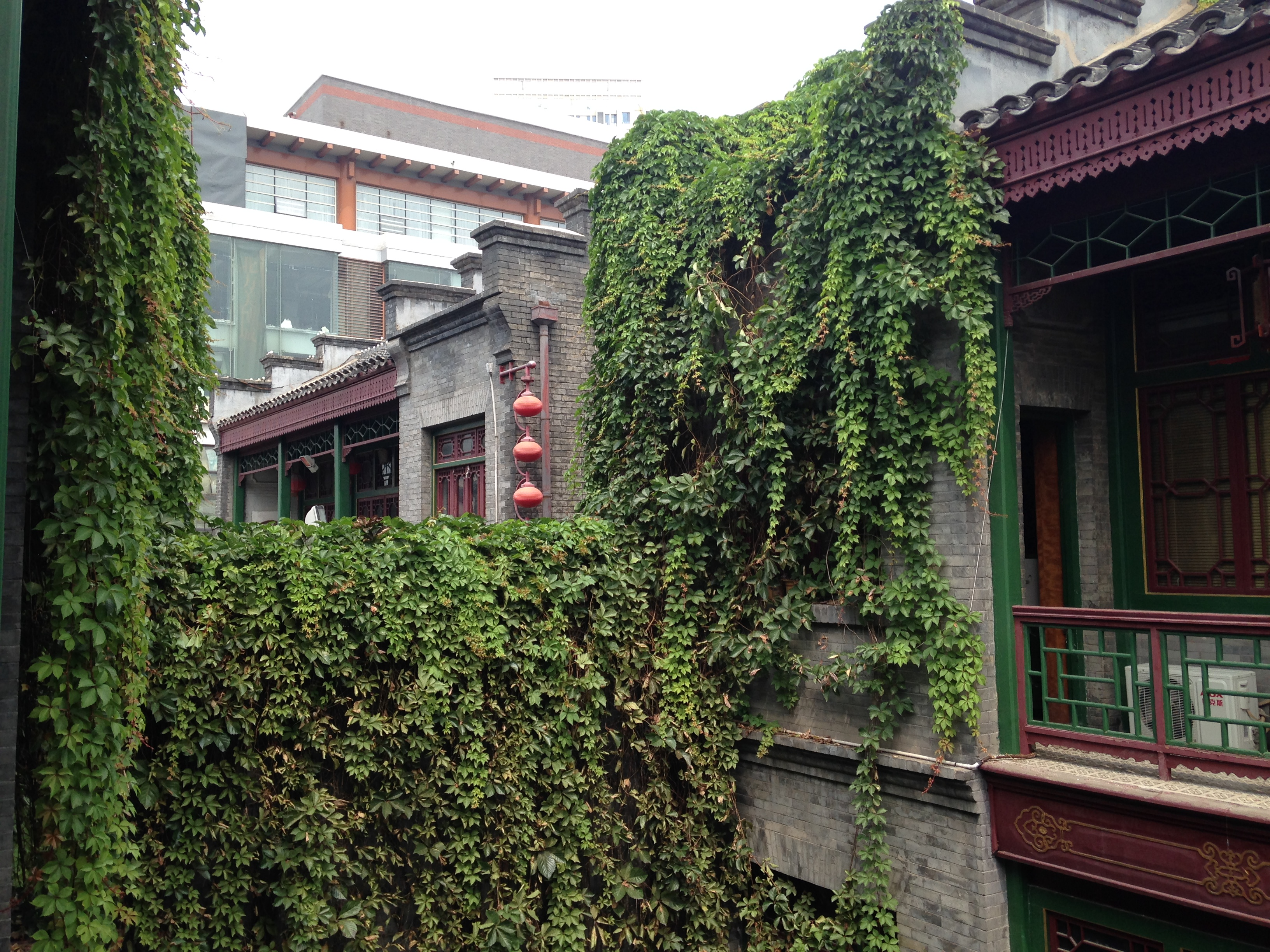 泥人張美術館内の様子